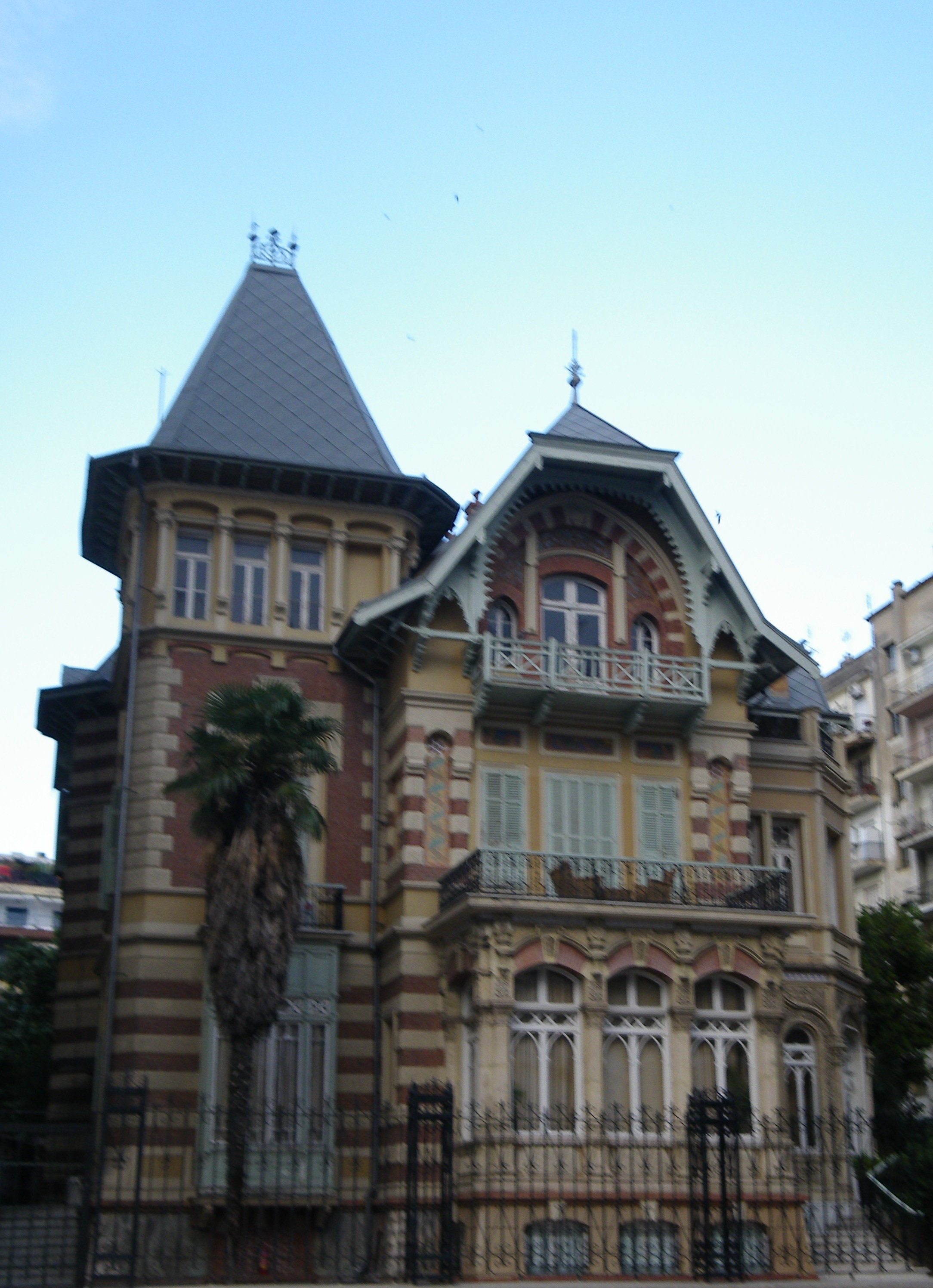 Βίλα Αχμέτ Καπατζή